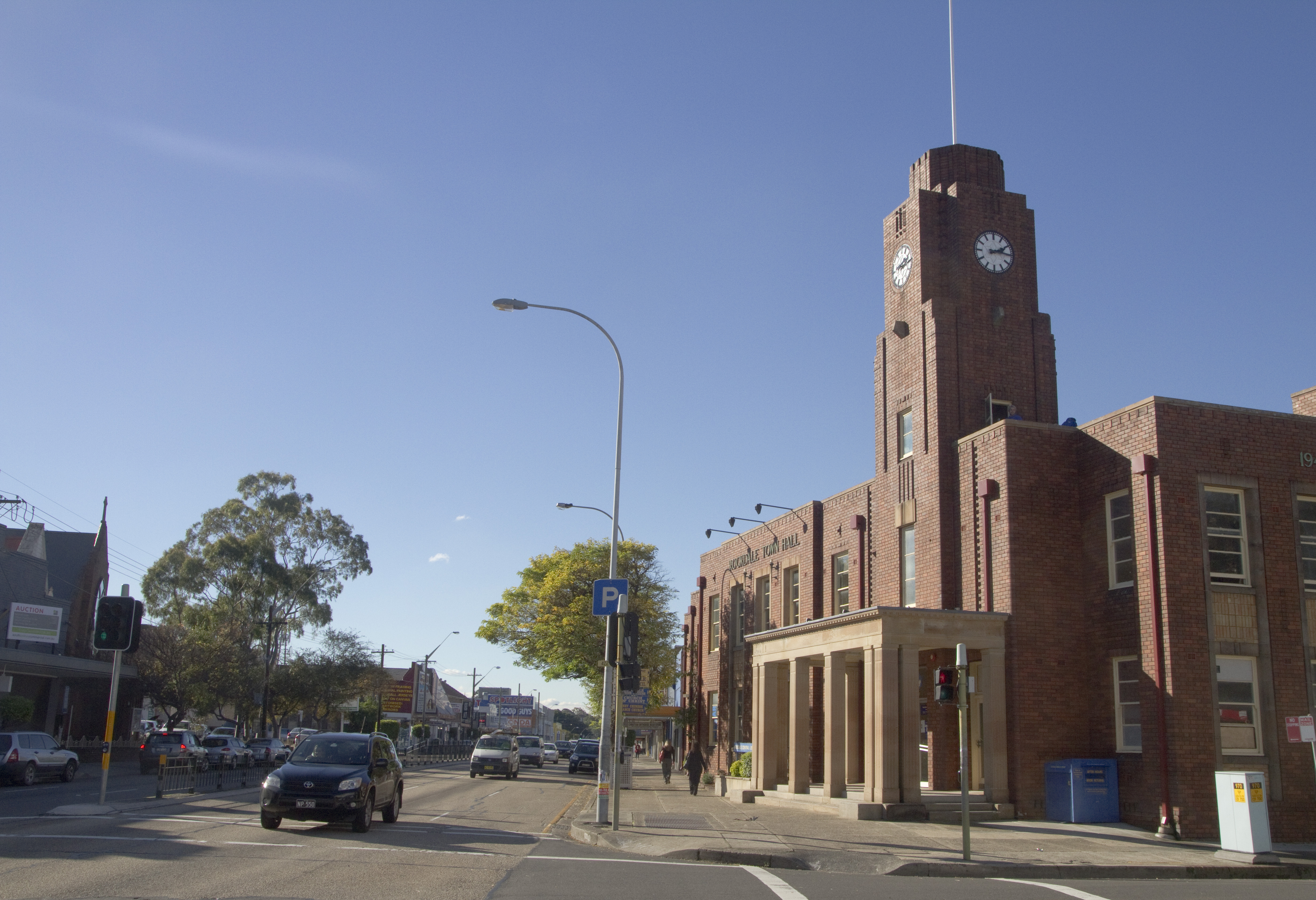 Rockdale NSW 2216, Australia